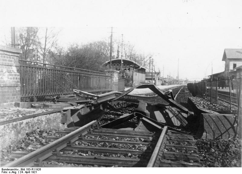 ADN-ZB/Archiv Revolutionäre Kämpfe im Frühjahr 1921 in Deutschland Gesprengter Eisenbahnkörper in Ammendorf bei Halle (24.4.1921)